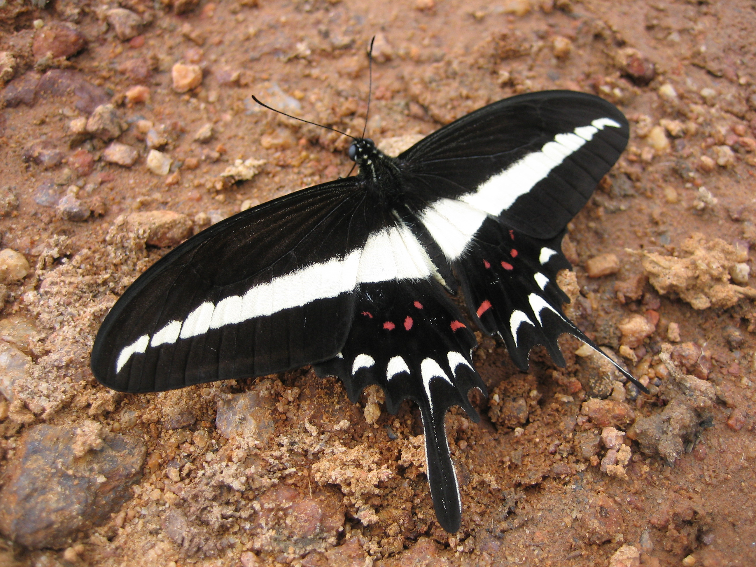 Foto tirada em Entre Rios de Minas - MG